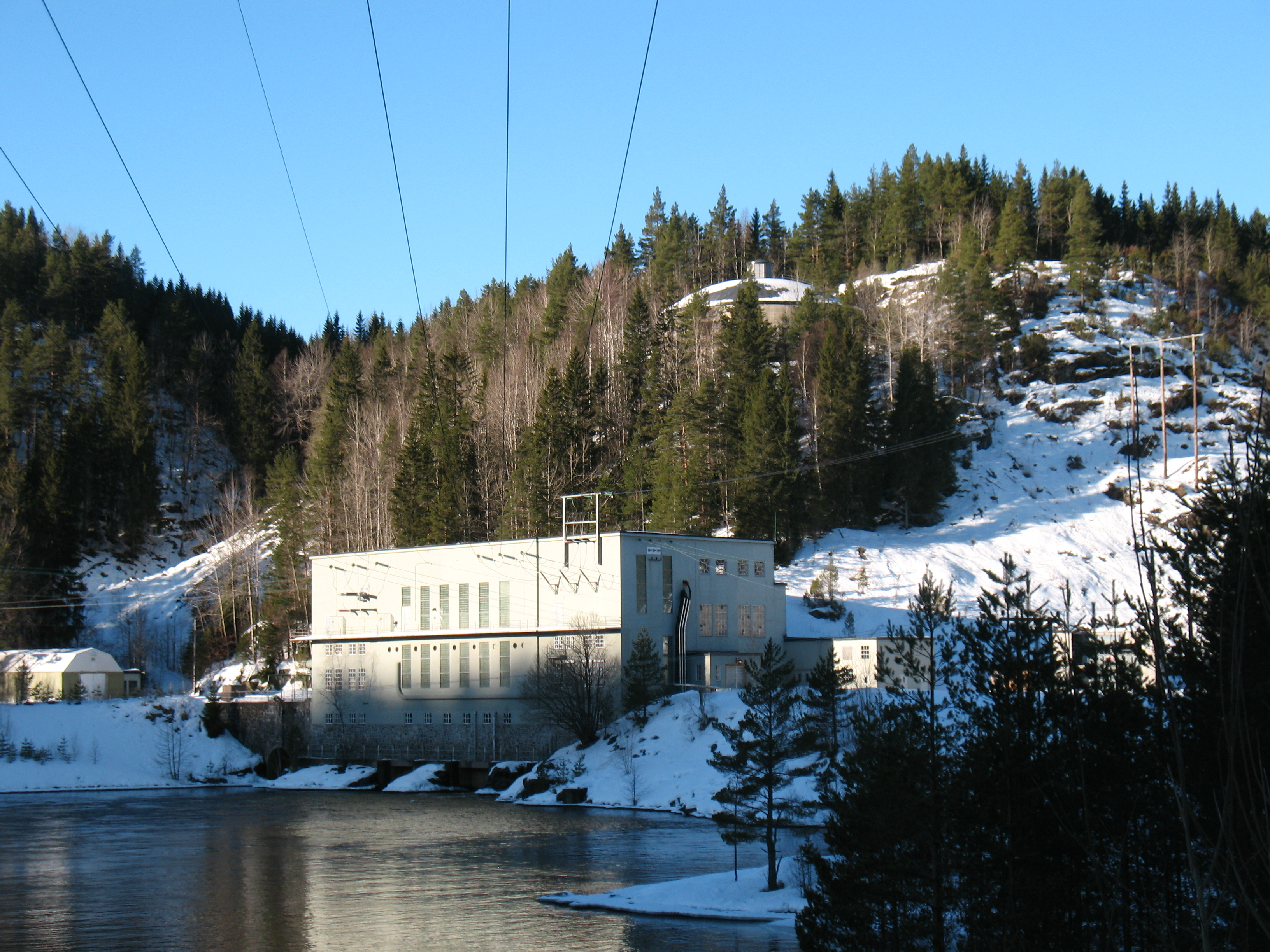 Iveland kraftstasjon på eiendommen Solkron i Iveland, Aust-Agder. Eid av Agder Energi.